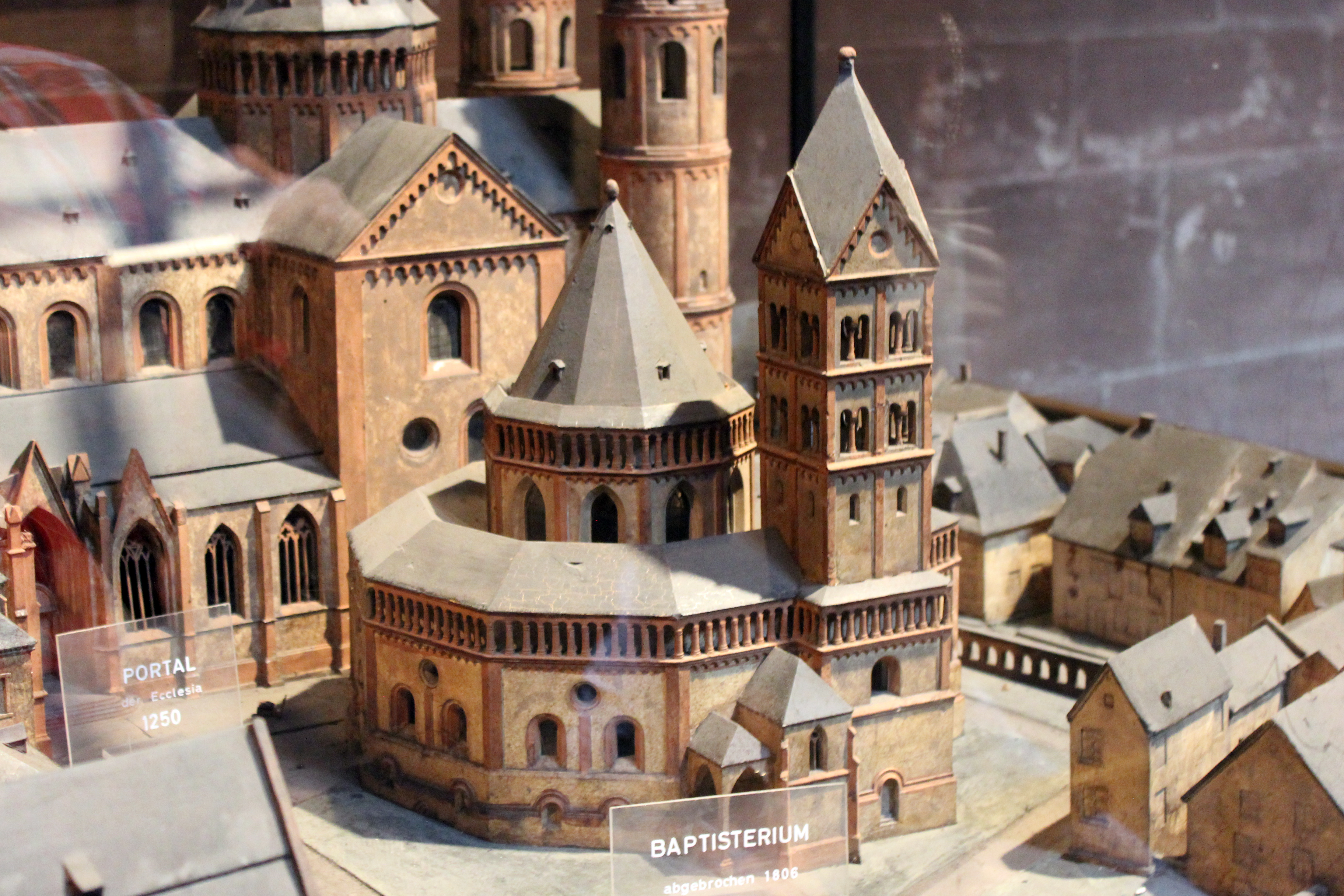 Modell der Johanneskirche (Worms) von Süden